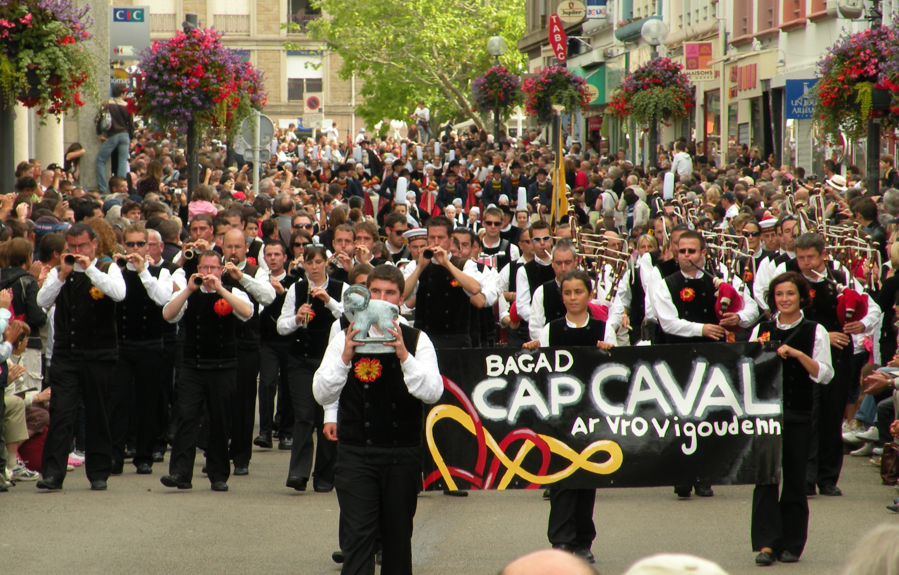 Le Bagad Cap Caval, lors du festival interceltique de Lorient 2009.